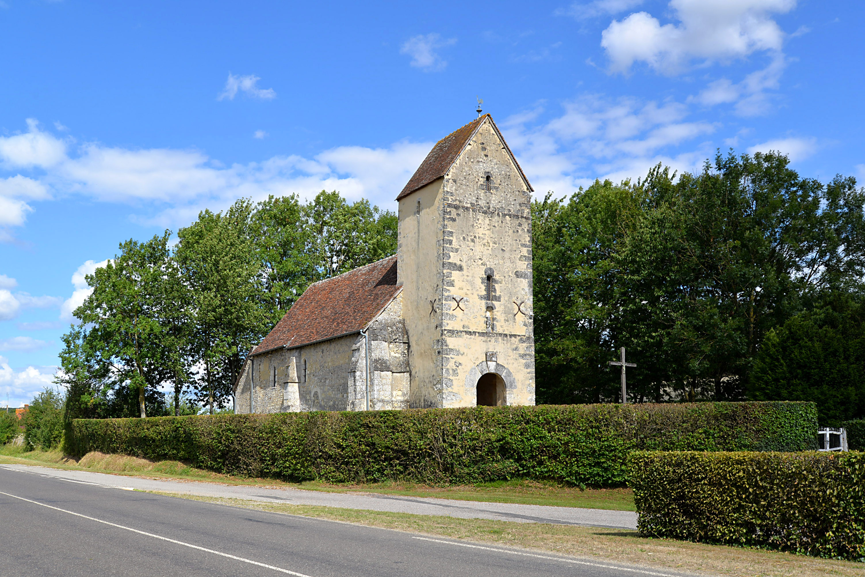 Boëcé (Orne)